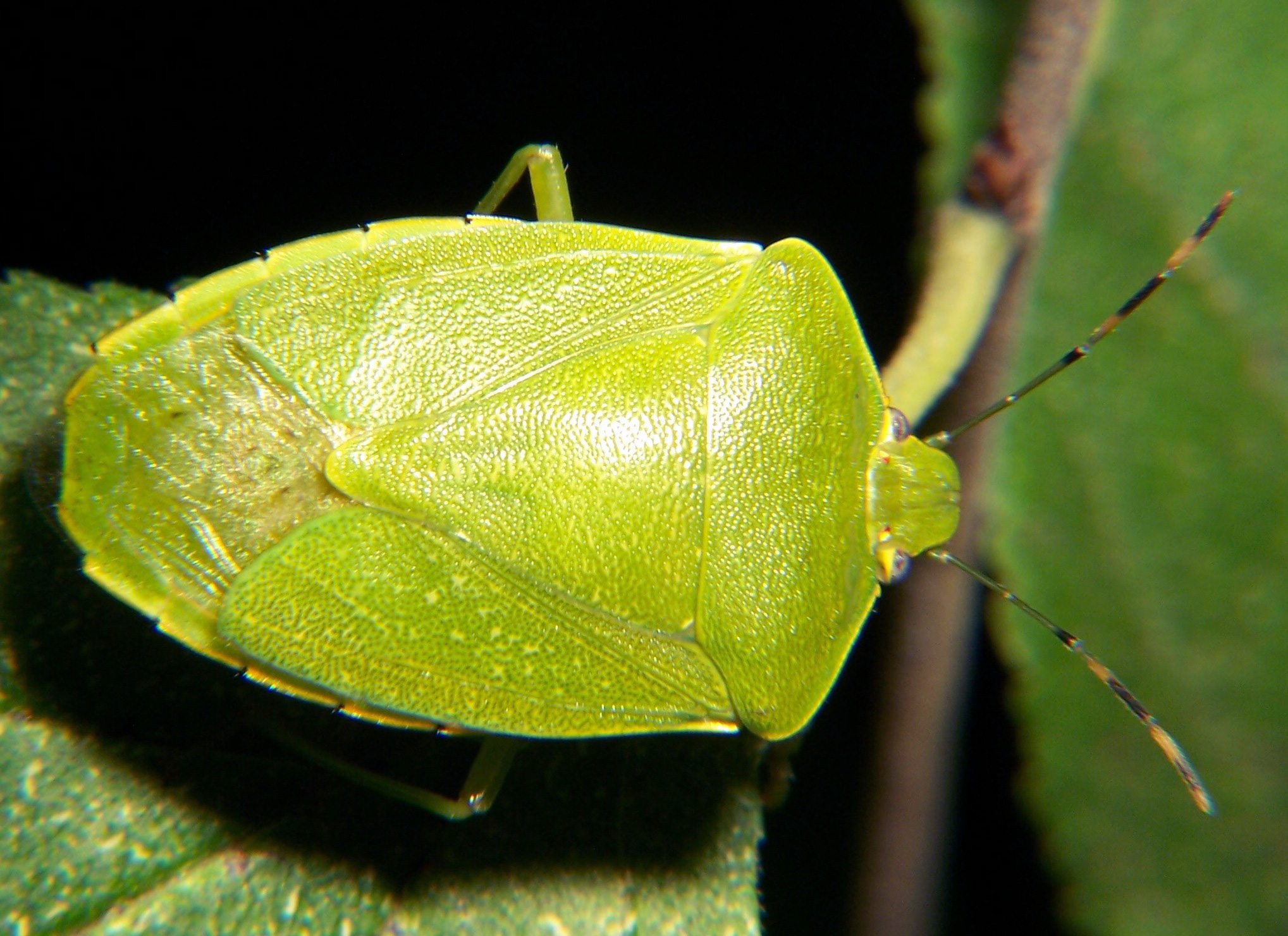 Adult stink bug, Acrosternum hilare